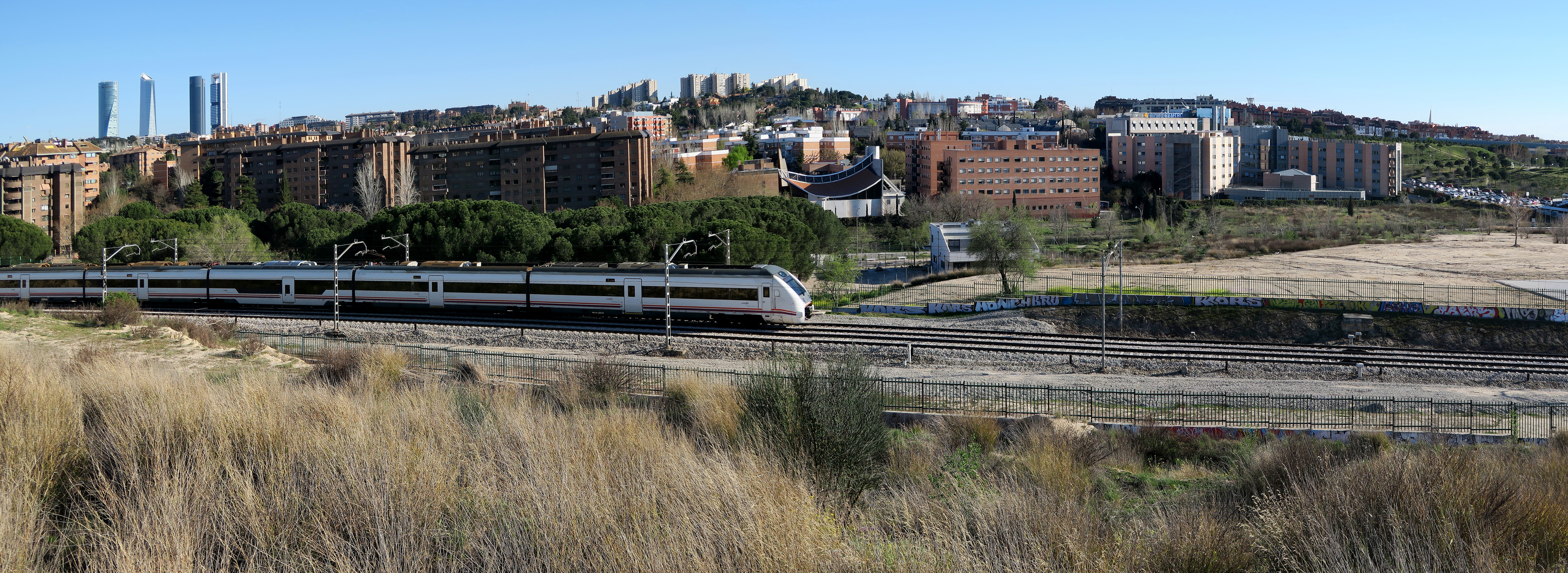 Mirasierra, panorámica